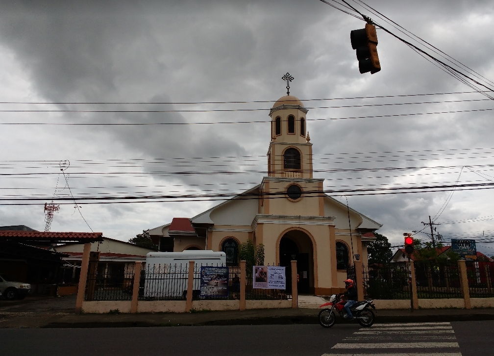 Iglesia de San Rafael Abajo, en Desamparados, Costa Rica.